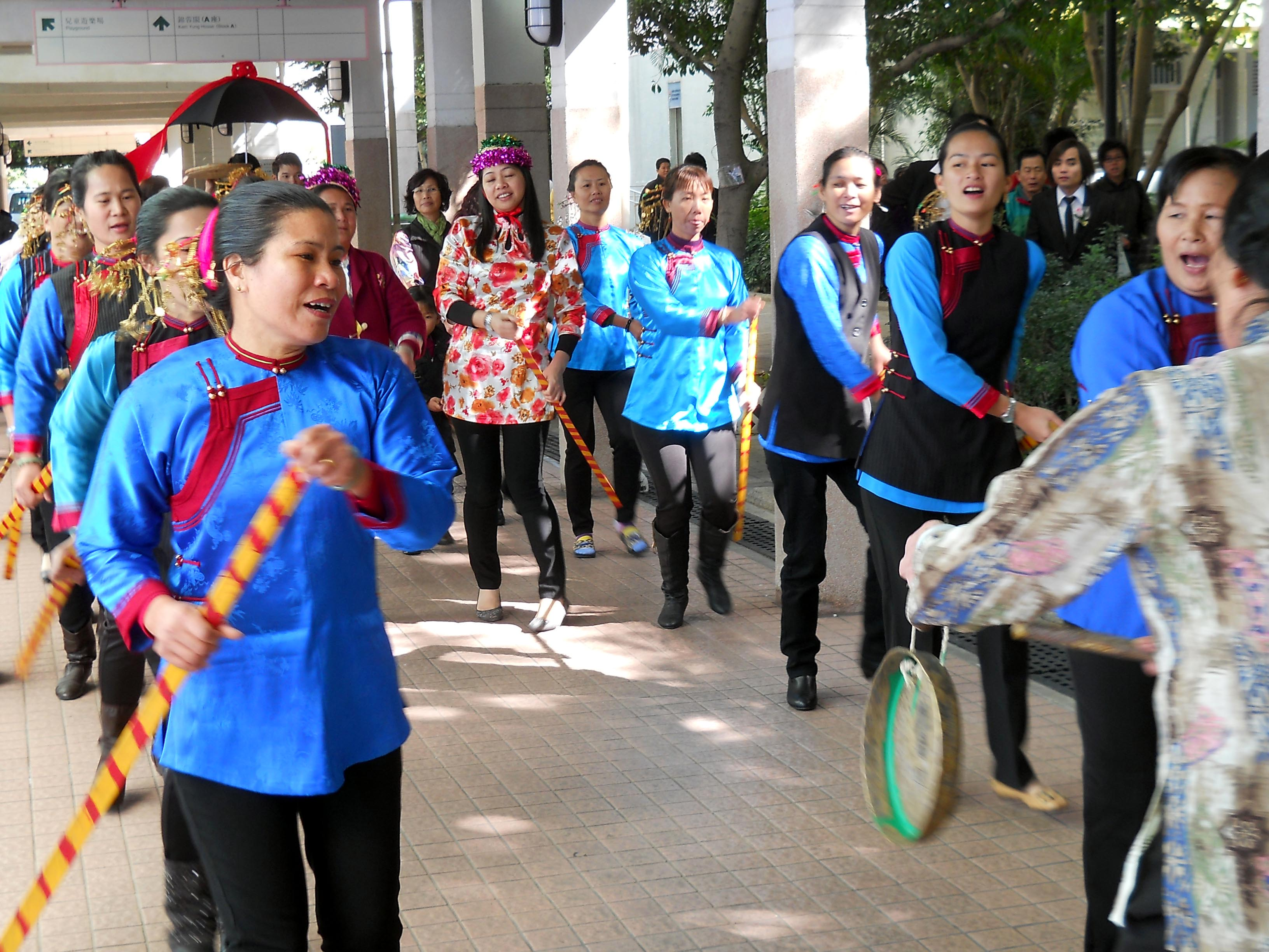 中文（香港）: 鶴佬陸上扒龍船